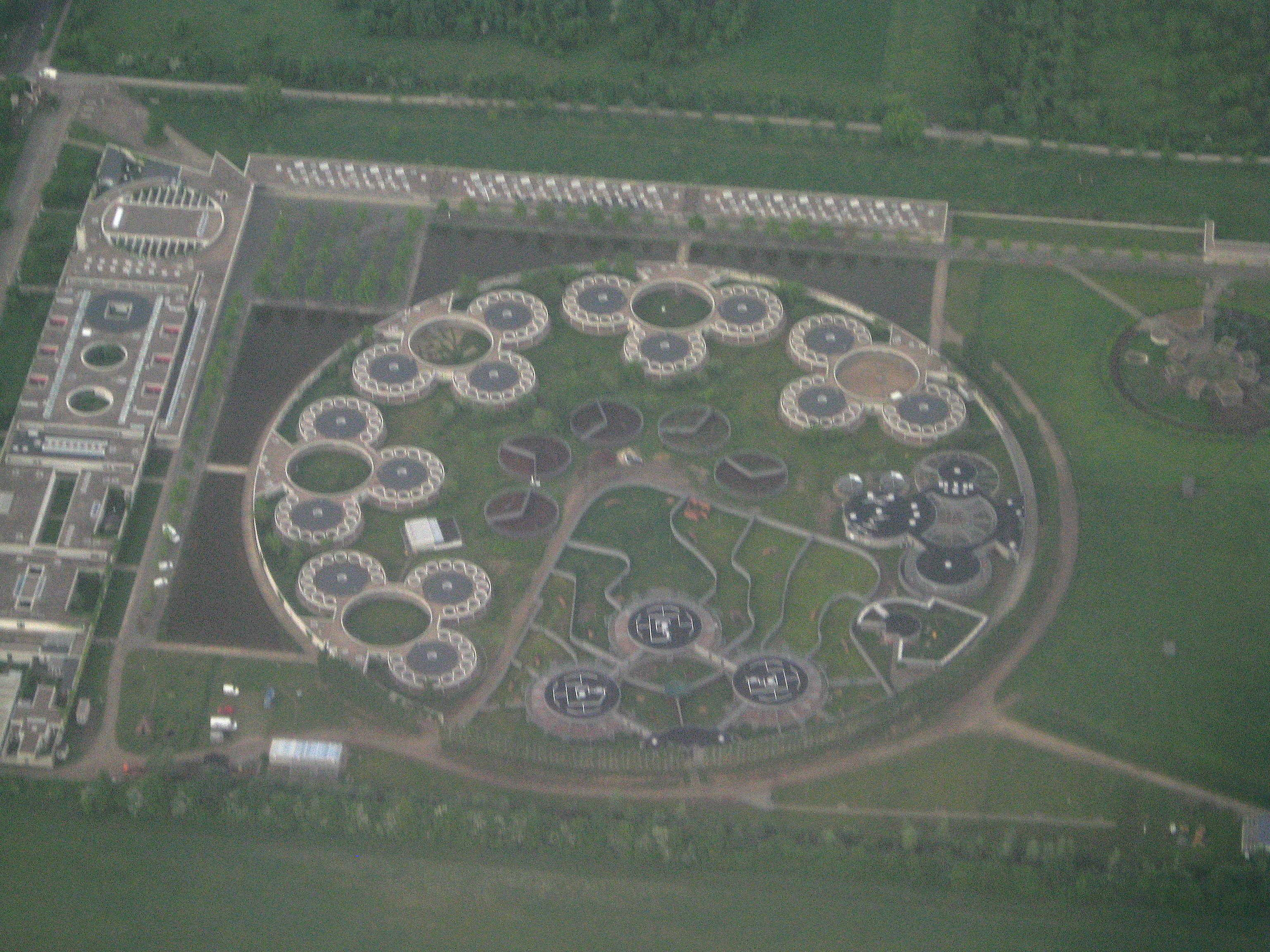 Tierheim Berlin Falkenberg Luftbild